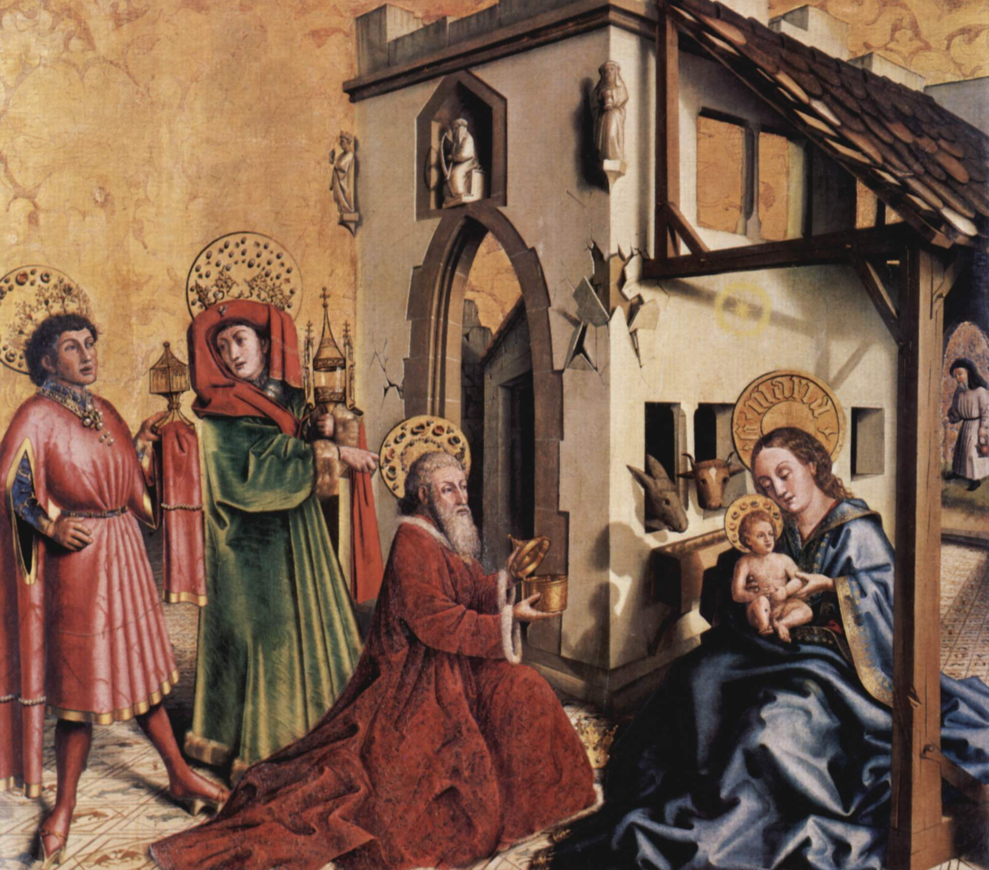 Petrusaltar, Fragment eines Altares der Petrus-Kathedrale in Genf, linker Flügel innen